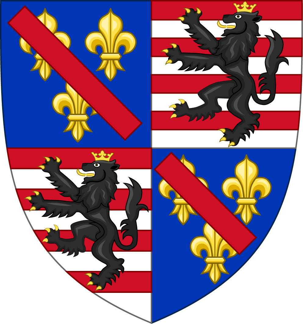 Armes de François de Bourbon, comte de Saint-Pol